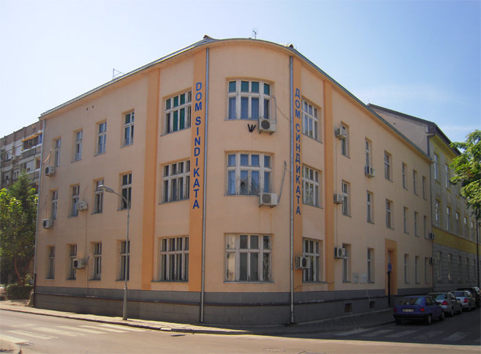 Дом_синдиката_у_Бањој_Луци